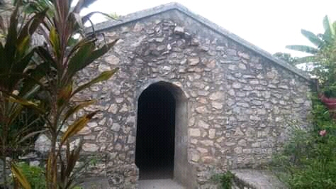 Le Fort Marfranc après la rénovation